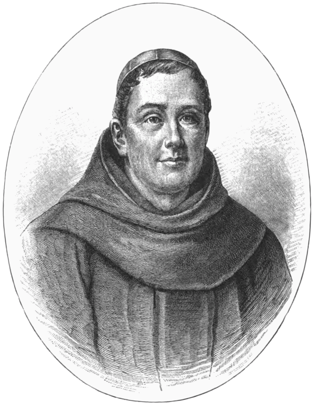 Andrija Kačić Miošić (1704-1760), Croatian monk, historian and poet